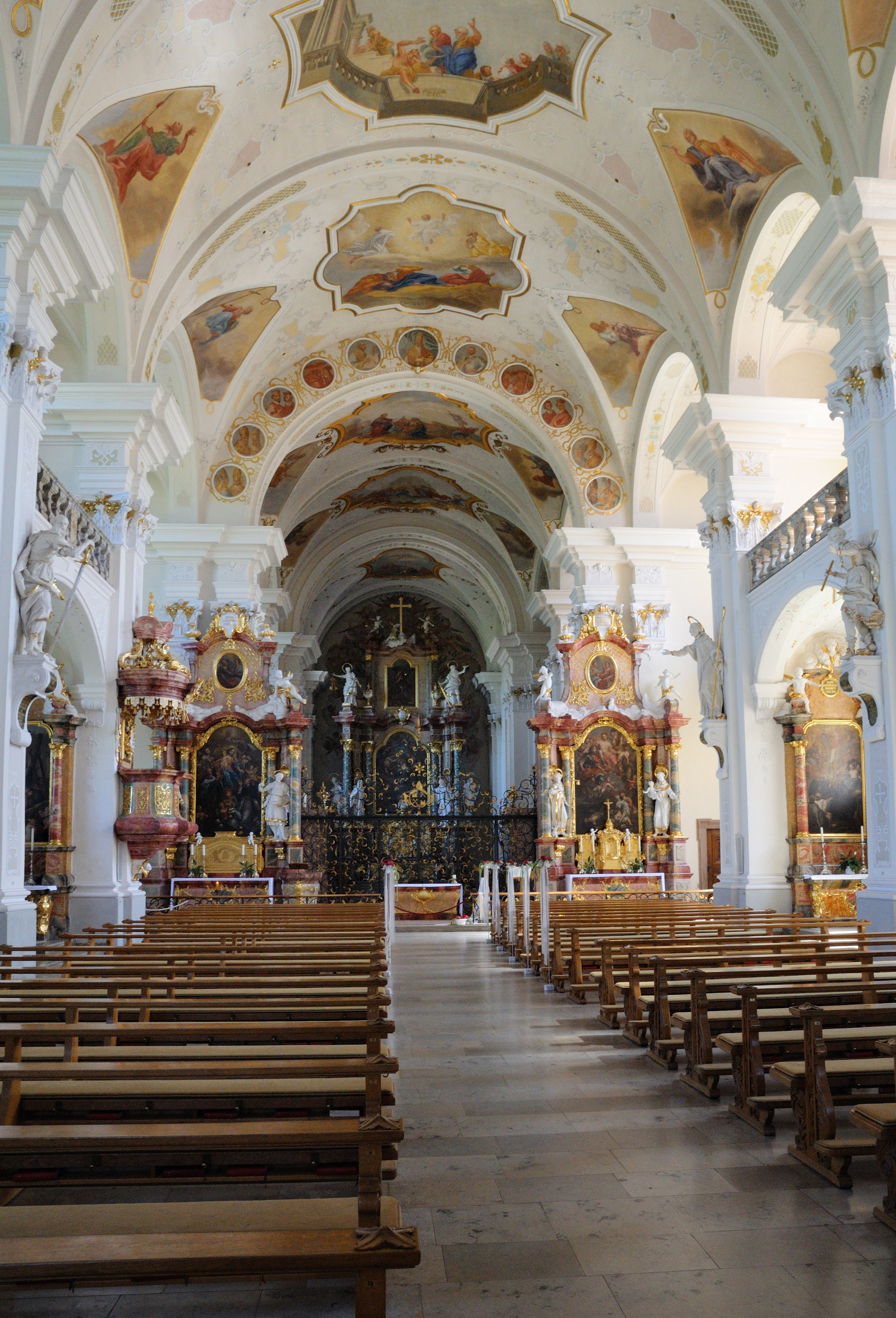 Klosterkirche St. Peter im Schwarzwald